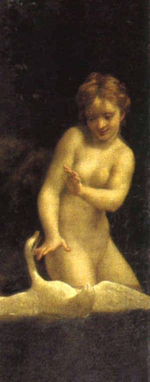 Correggio, leda, dettaglio